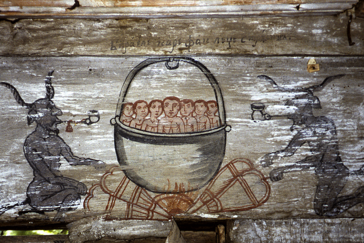 Biserica de lemn din Corund, judeţul Satu Mare.